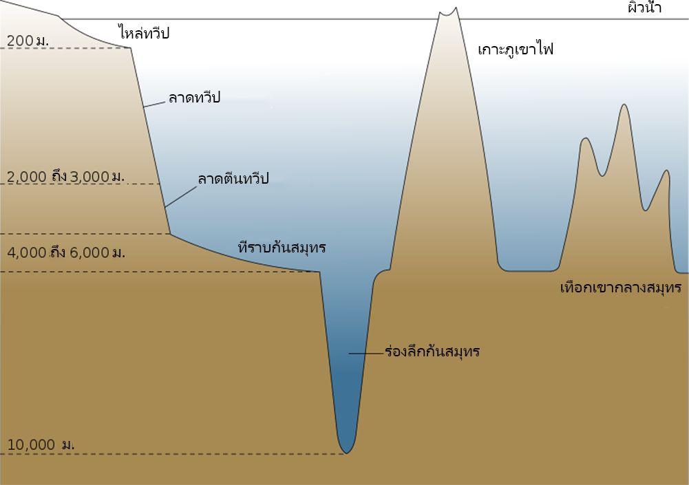 แผนภาพตัดตามขวางของแอ่งมหาสมุทร แสดงความสัมพันธ์ระหว่างที่ราบก้นสมุทรกับลาดตีนทวีปและร่องลึกก้นสมุทร